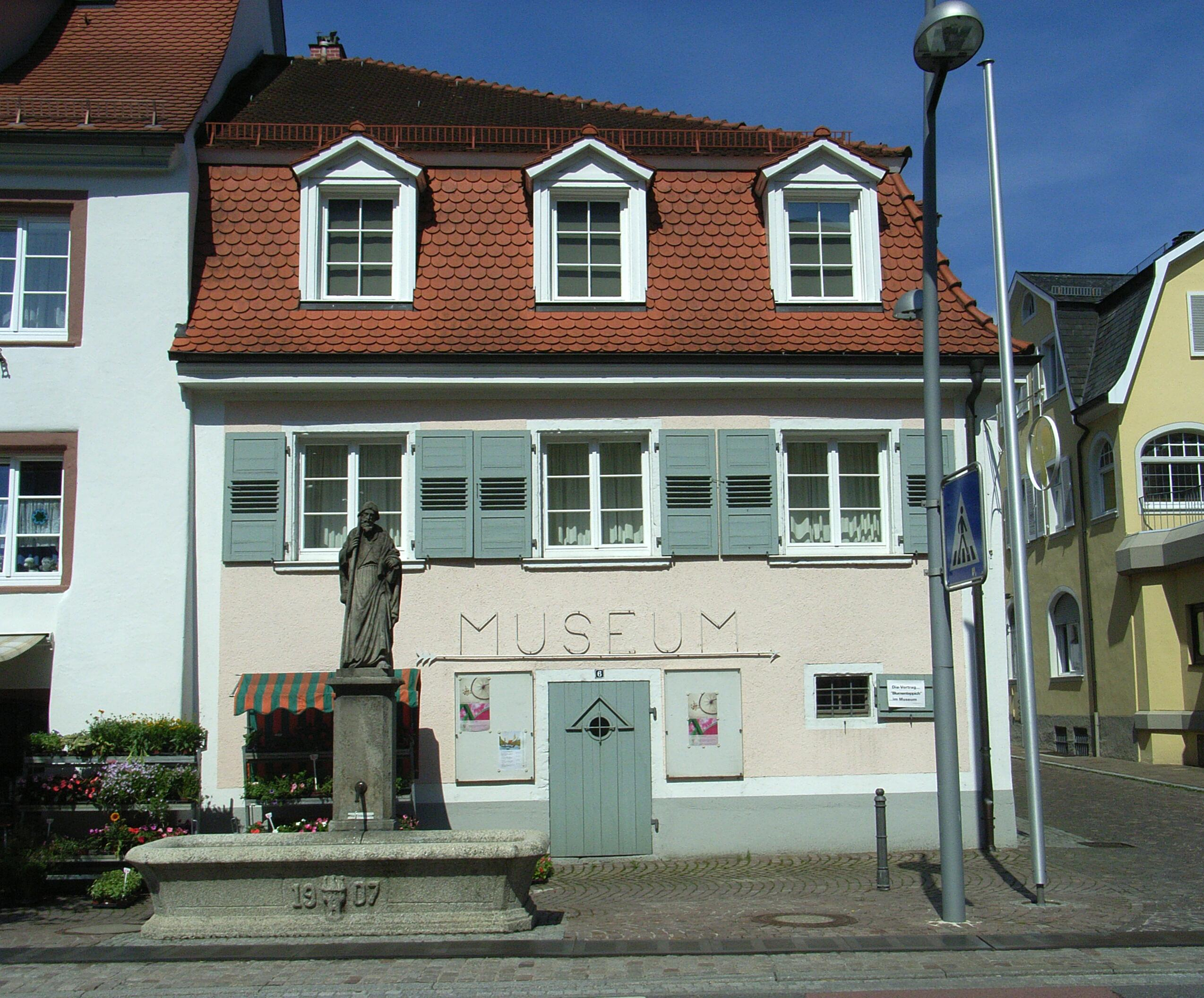 Dieses Bild zeigt ein Museum in Hüfingen.